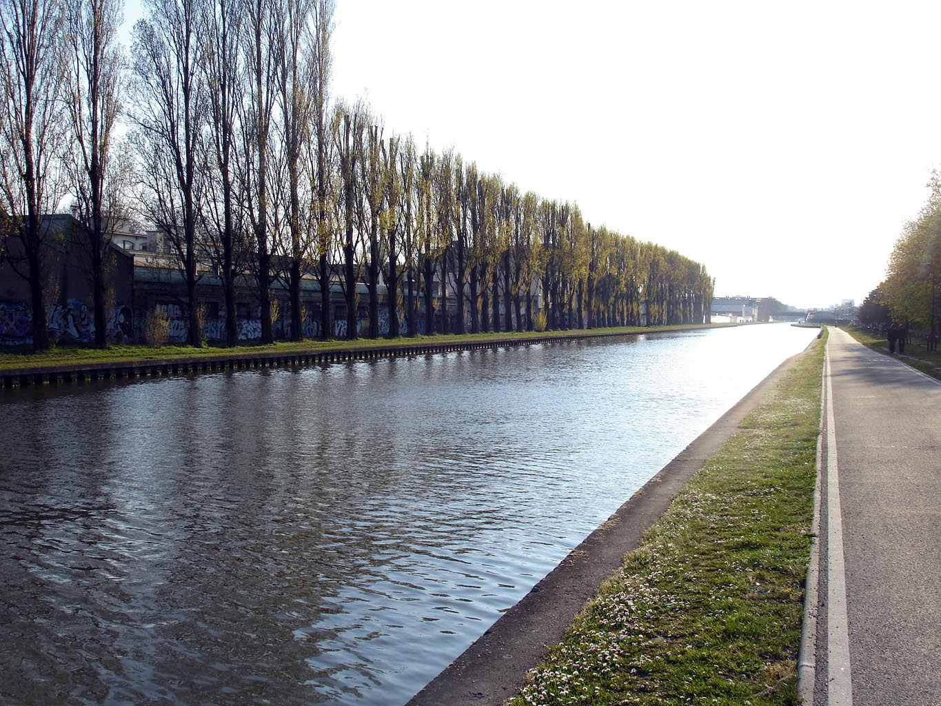 Canal de l'Ourcq au parc de la Bergère à Bobigny (Seine-Saint-Denis), France